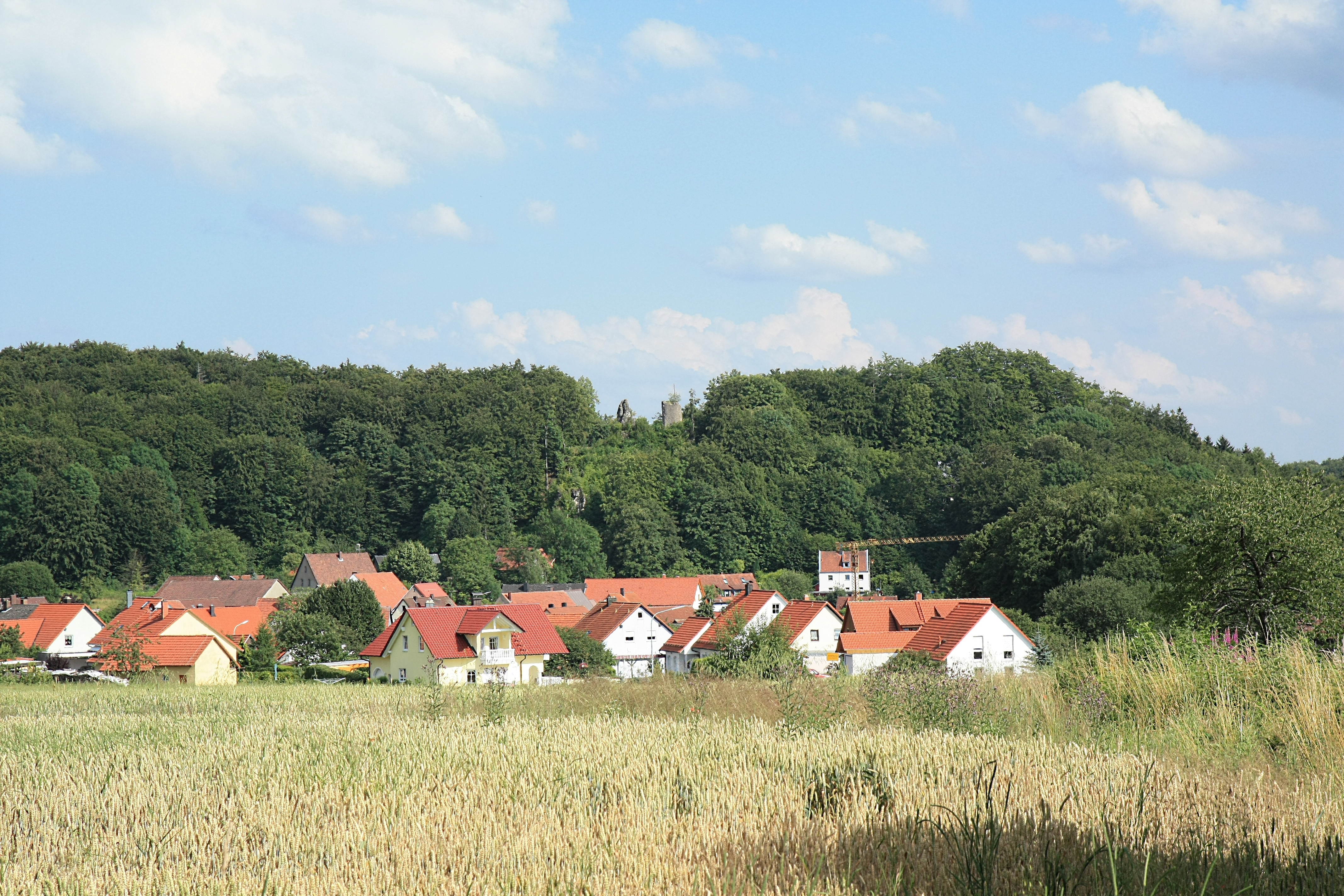 Ansicht von Dorf und Burgruine Stierberg von Nordwesten.